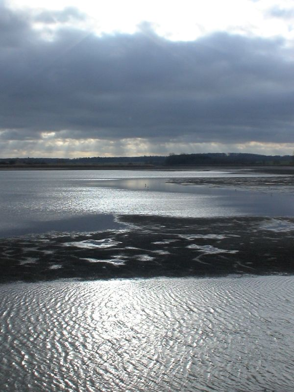 L'Étang de Lindre en contre-jour, Nov. 2005